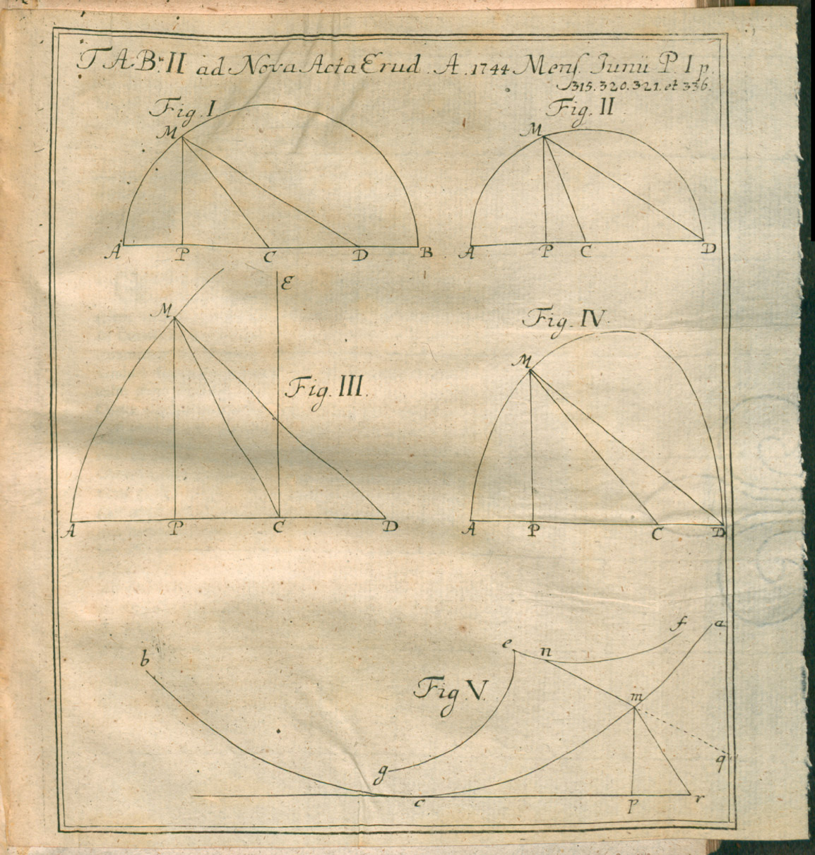 Illustration